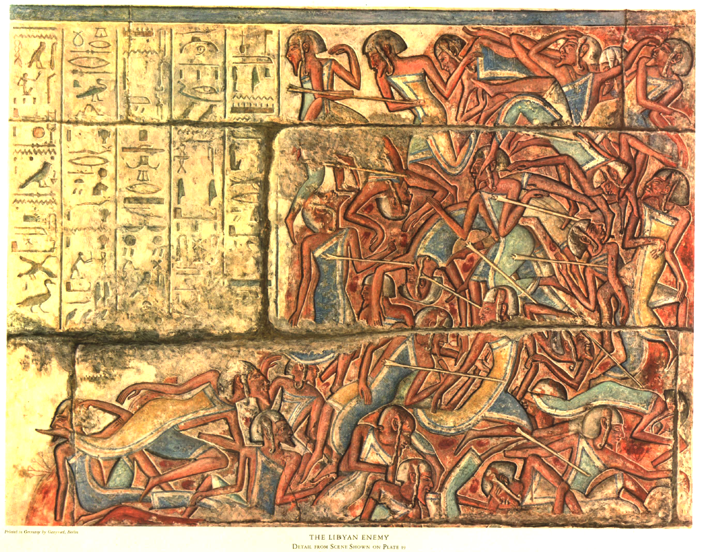 Reliefy z Medinet Habu